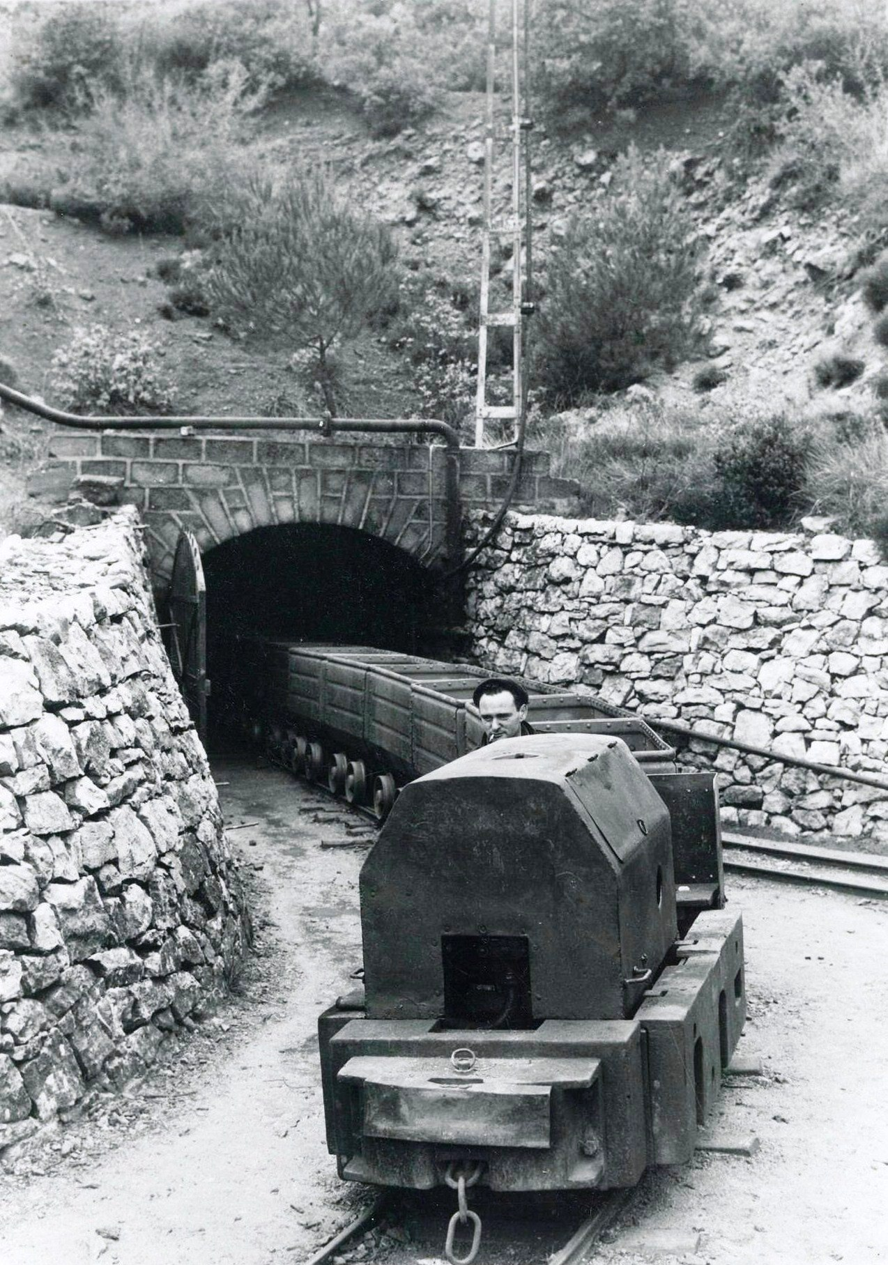 Sortie de mine d'une locomotive tirant des berlines